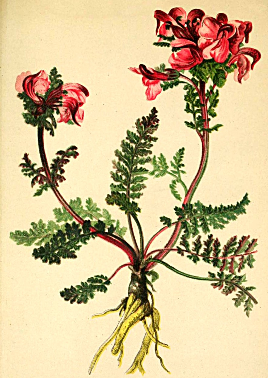 Pedicularis rostrata (= Pedicularis rostratocapitata)